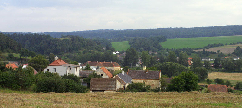 Pohled na Nebřeziny od severu.